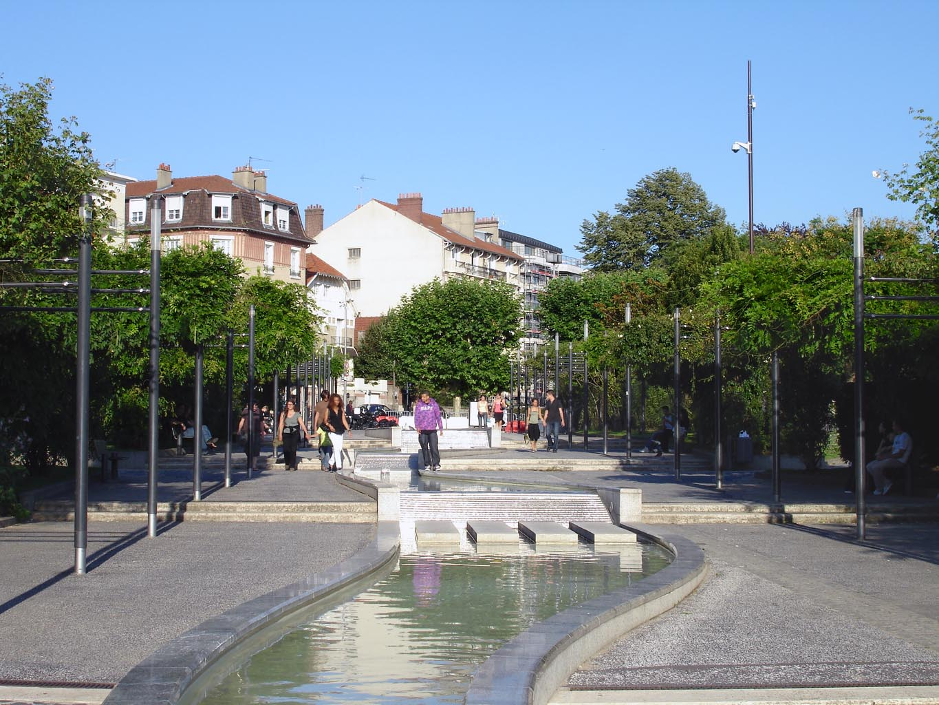 Le jardin des Roses à Enghien-les-Bains (Val-d'Oise), France Juillet 2007 Photo personnelle (own work) de Clicsouris